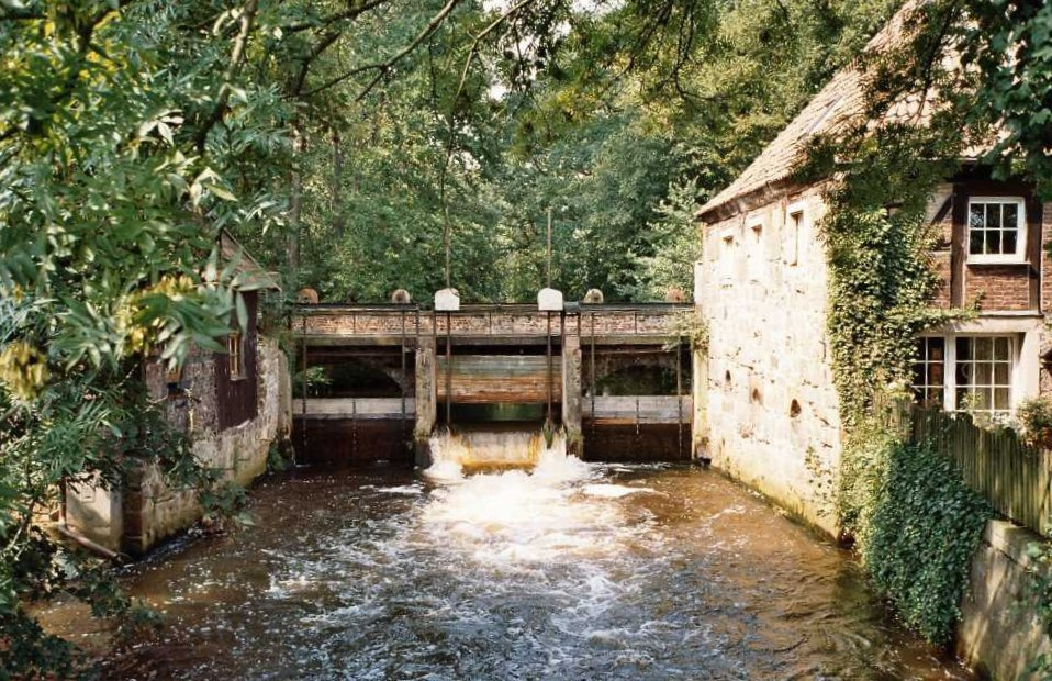 Die "Große Teichsmühle" bei Hausdülmen, Dülmen